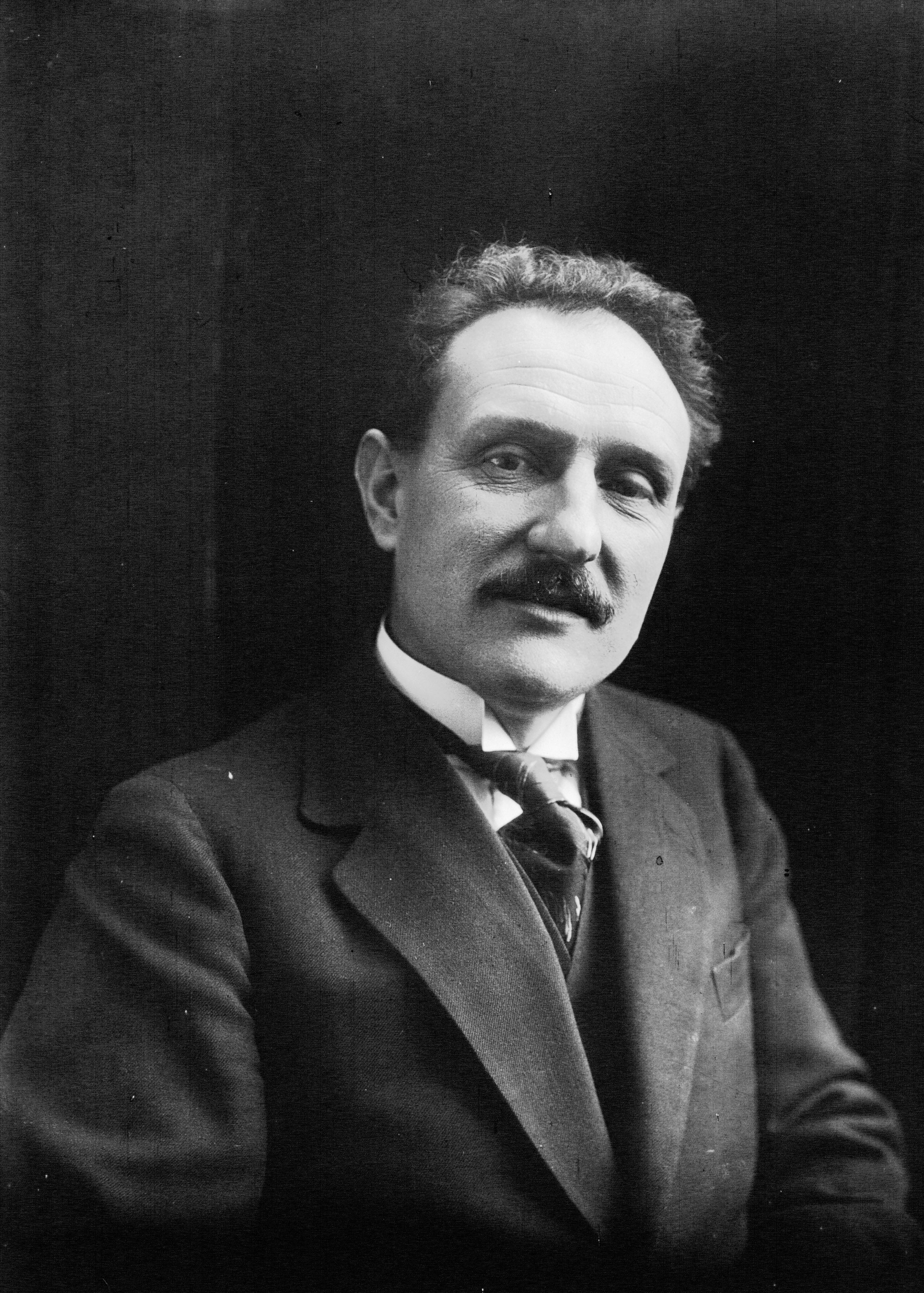 Portrait de Camille Chautemps, ministre de l'Intérieur dans le gouvernement Briand.